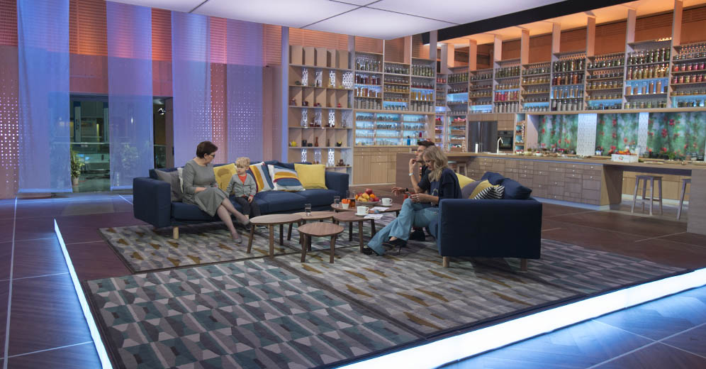 Premier Ewa Kopacz gościła w programie "Pytanie na śniadanie" (TVP2).